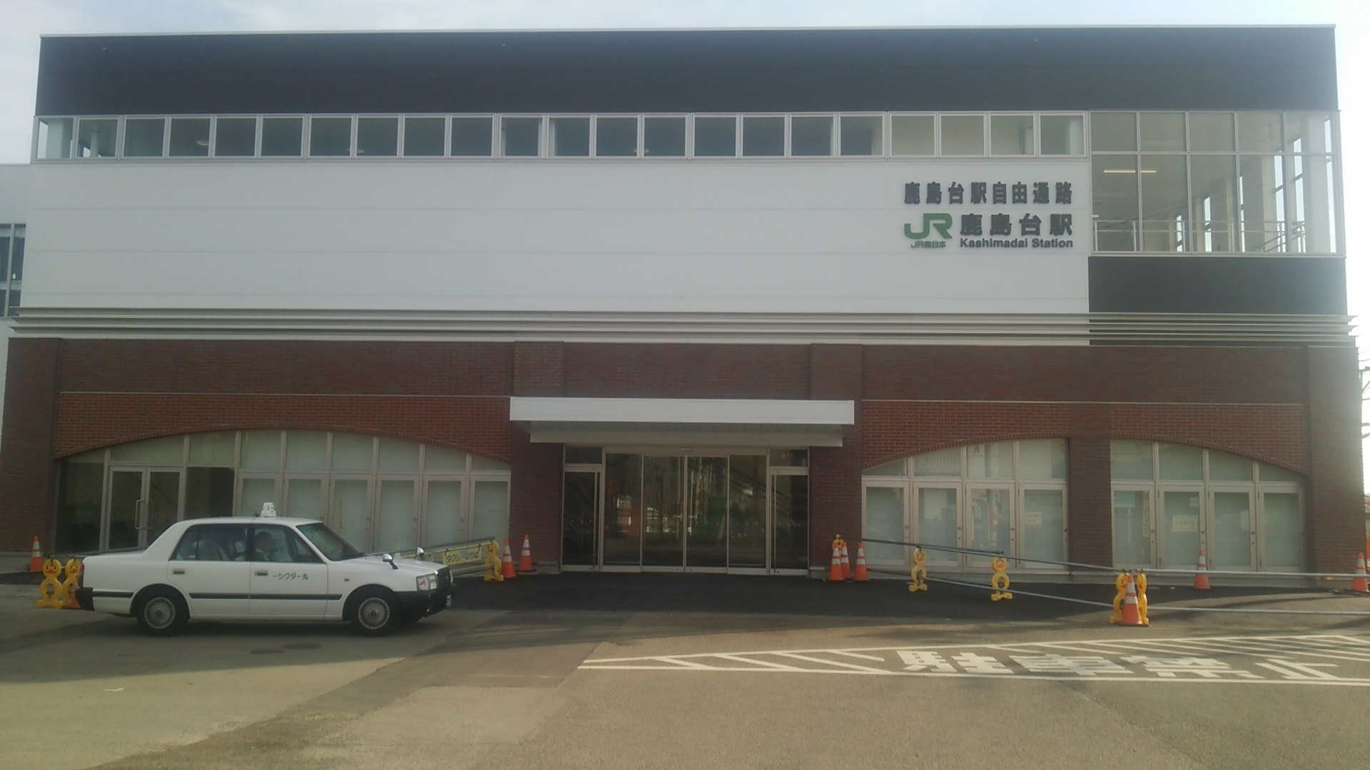 鹿島台駅西口